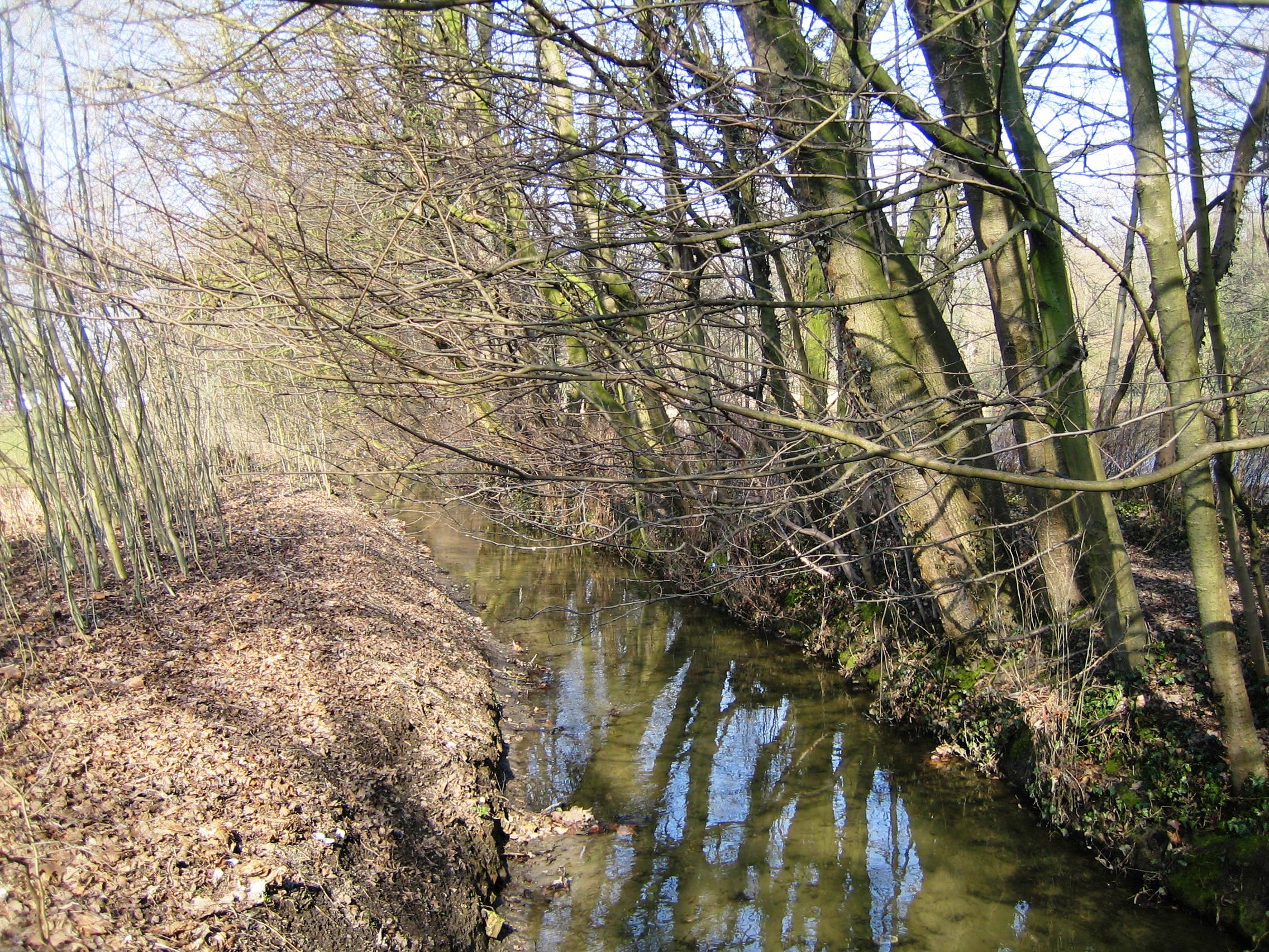 Річка Волюве в межах комуни Волюве-Сен-П'єр.